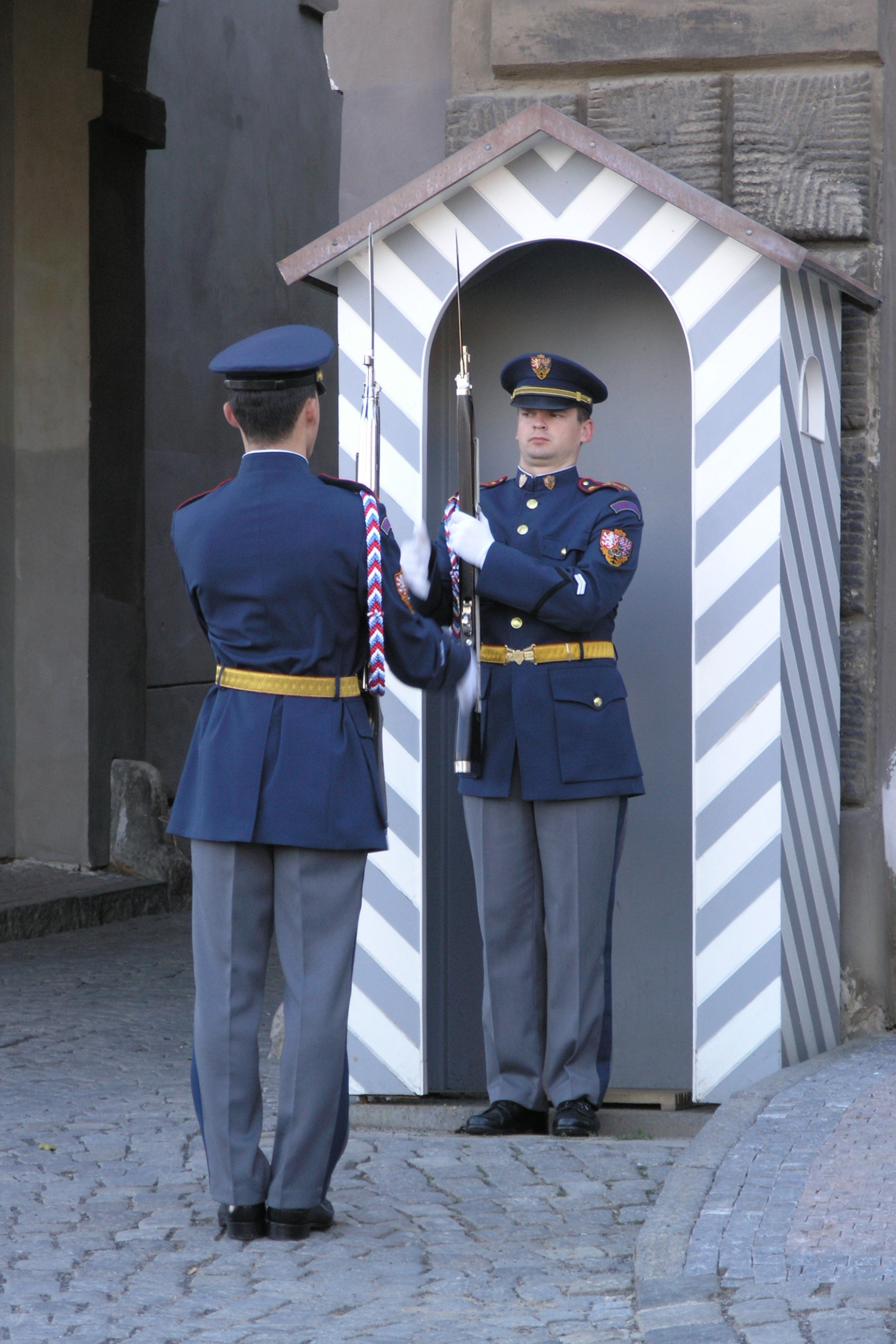 Pražský hrad - střídání hradní stráže